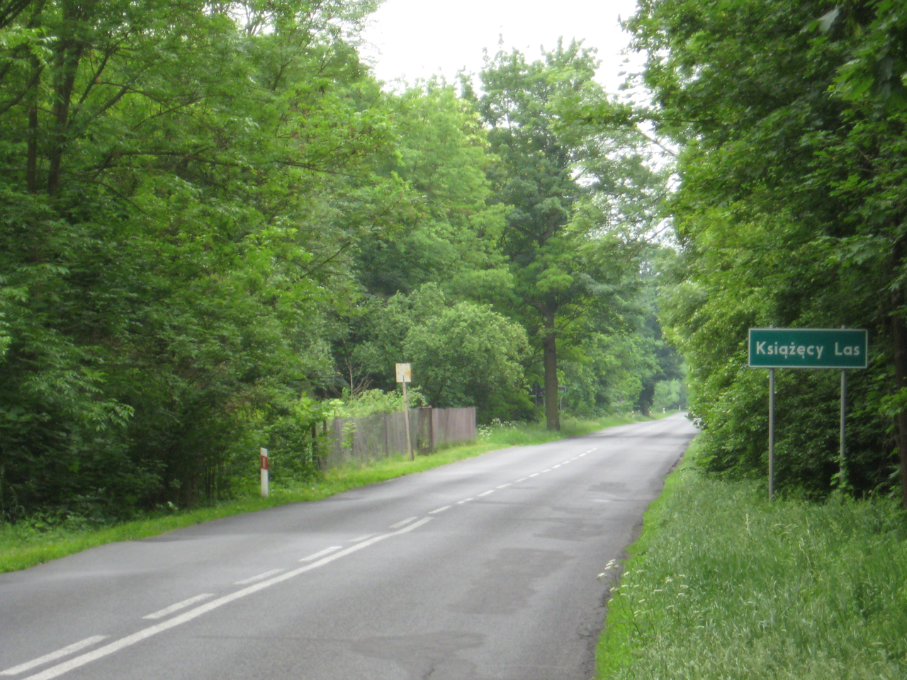 Książęcy Las